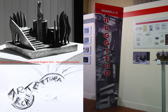 Mostra Vivarelli Pistoia